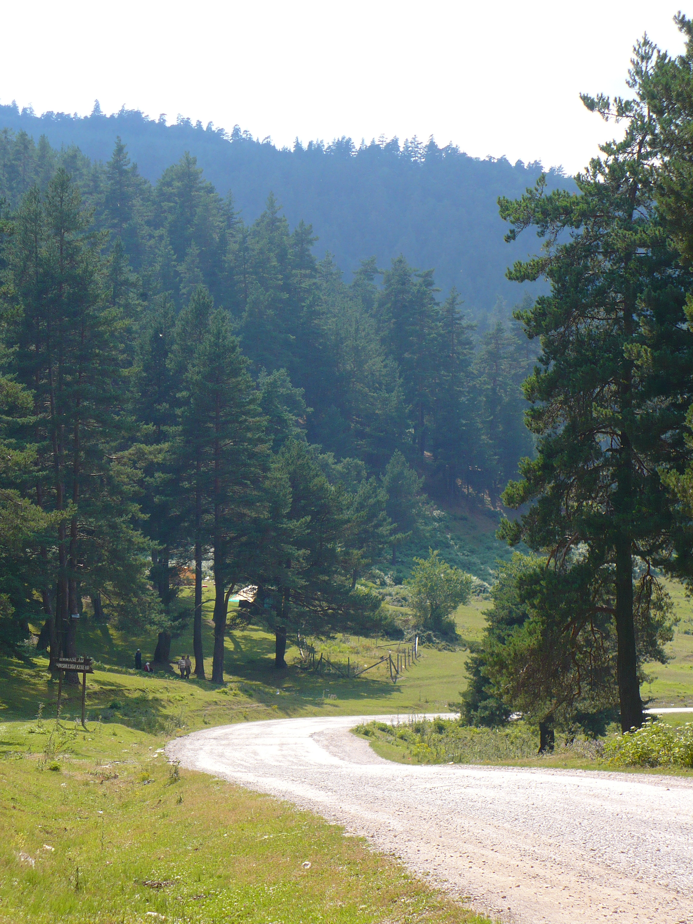 Kunduz ormanı